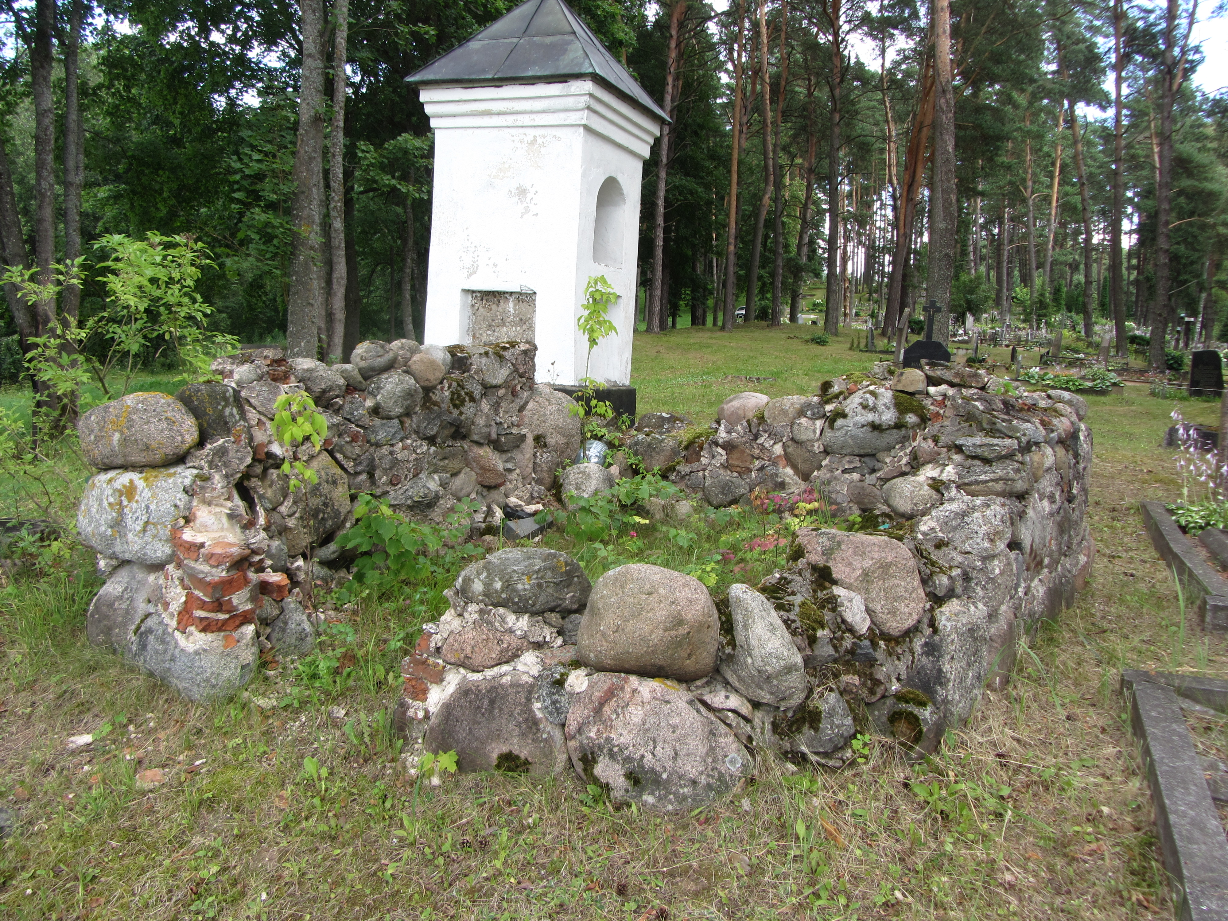 Antalieptė, Lithuania